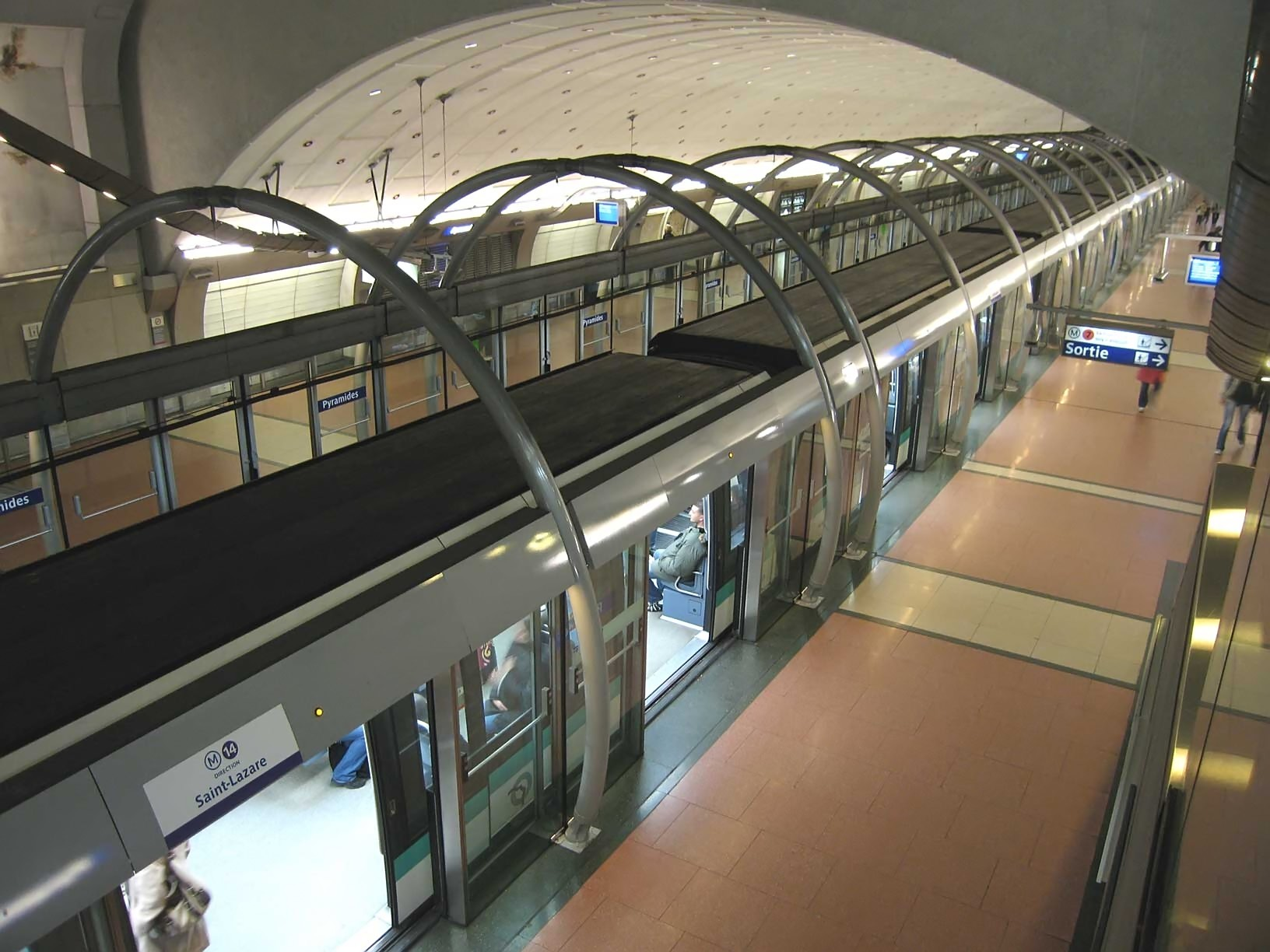 Métro de Paris, Station Pyramides (ligne 14), Paris, France